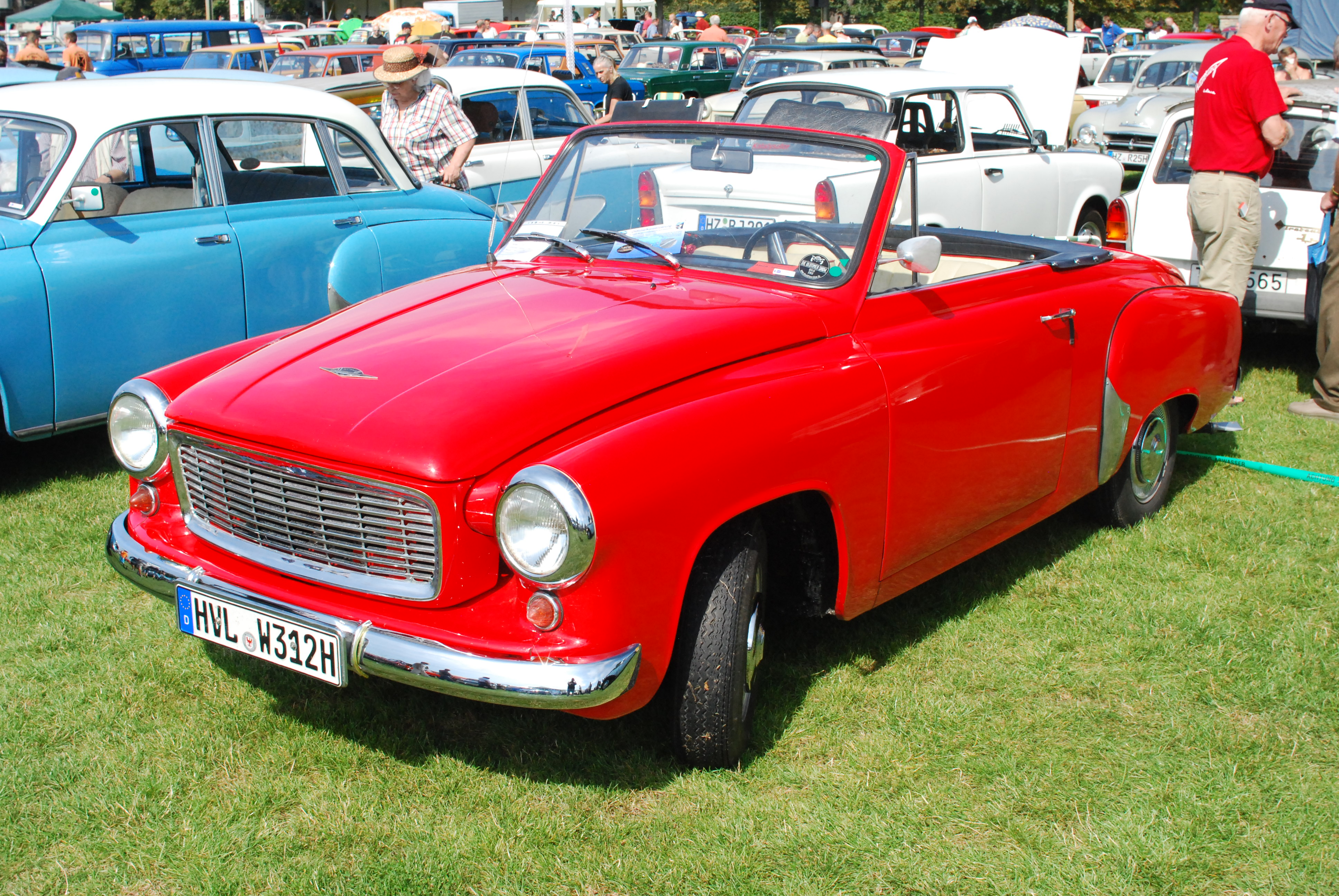 Wartburg 312-300 HT Fotos von der OMMMA 2011 am 03.09.2011 im Magdeburger Elbauenpark